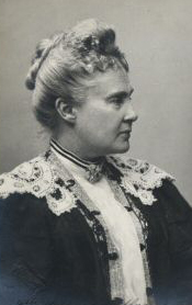 Arquiduquesa Maria Teresa de Áustria-Teschen (1845-1927).